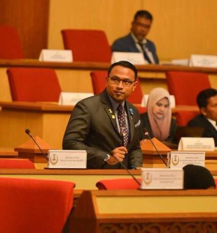 Ariffzaky